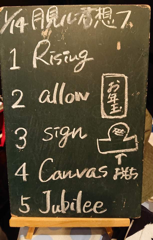 amiinAセトリボード(20190114(1))